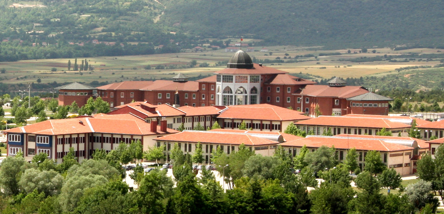 Kütahya Dumlupınar Üniversitesinin Evliya Çelebi Yerleşkesi'ndeki Rektörlük binası (arkada). Önde üniversitenin Mühendislik Fakültesine ait bloklar.